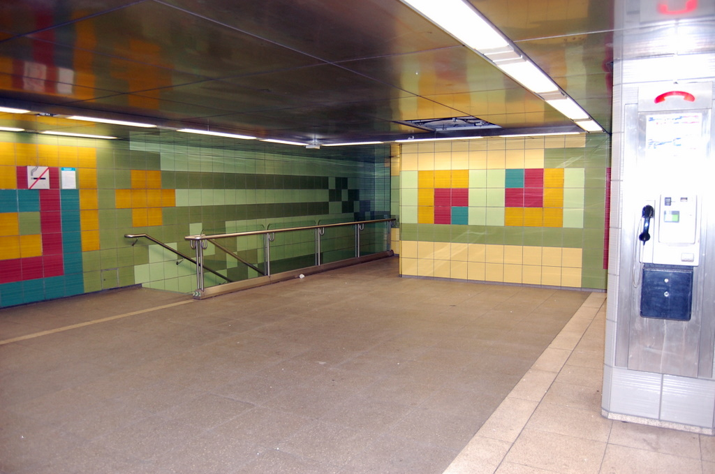 U-Bahnhof Grüneburgweg